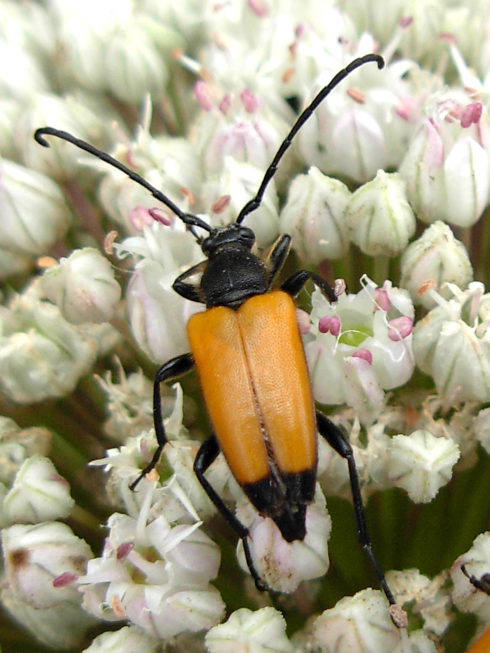 Paracorymbia fulva (in allium porrum).